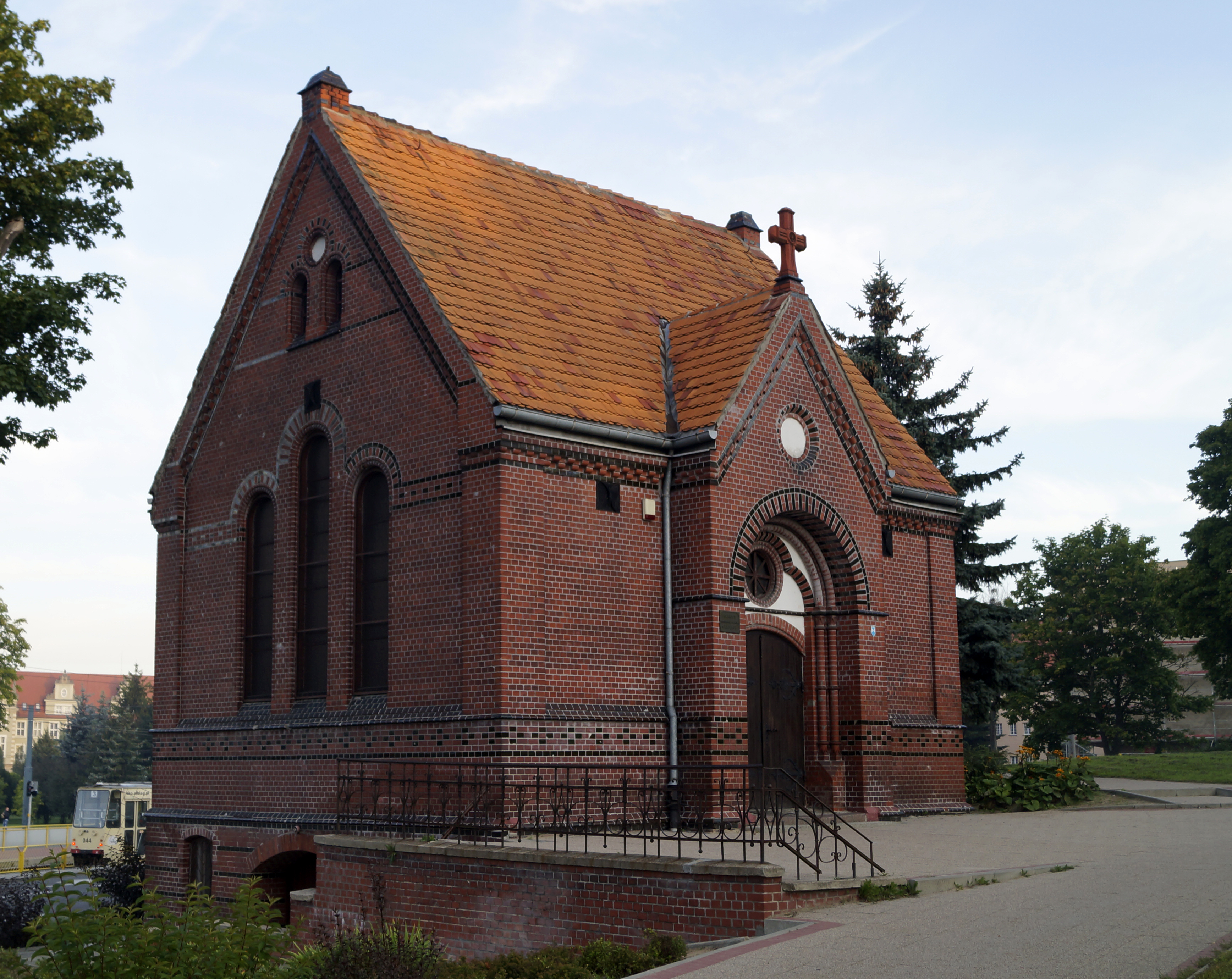 Elbląg, ul. Traugutta 15 - pierwotnie ewangelicka kaplica cmentarna p.w. św. Anny, obecnie cerkiew greckokatolicka św. Jana Chrzciciela, 1902